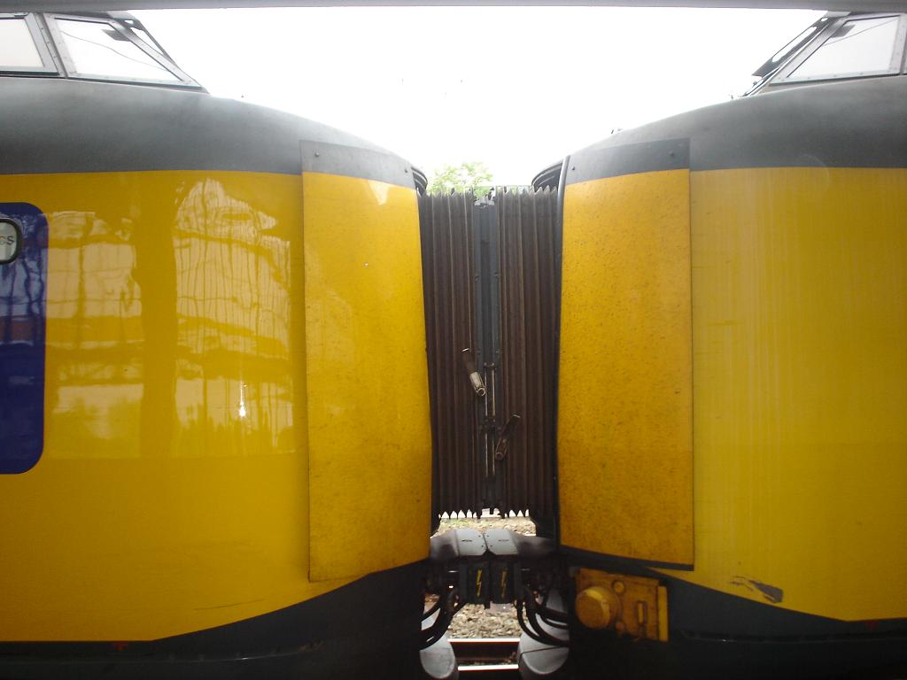 Doorloopkop tussen twee ICM-treinstellen.